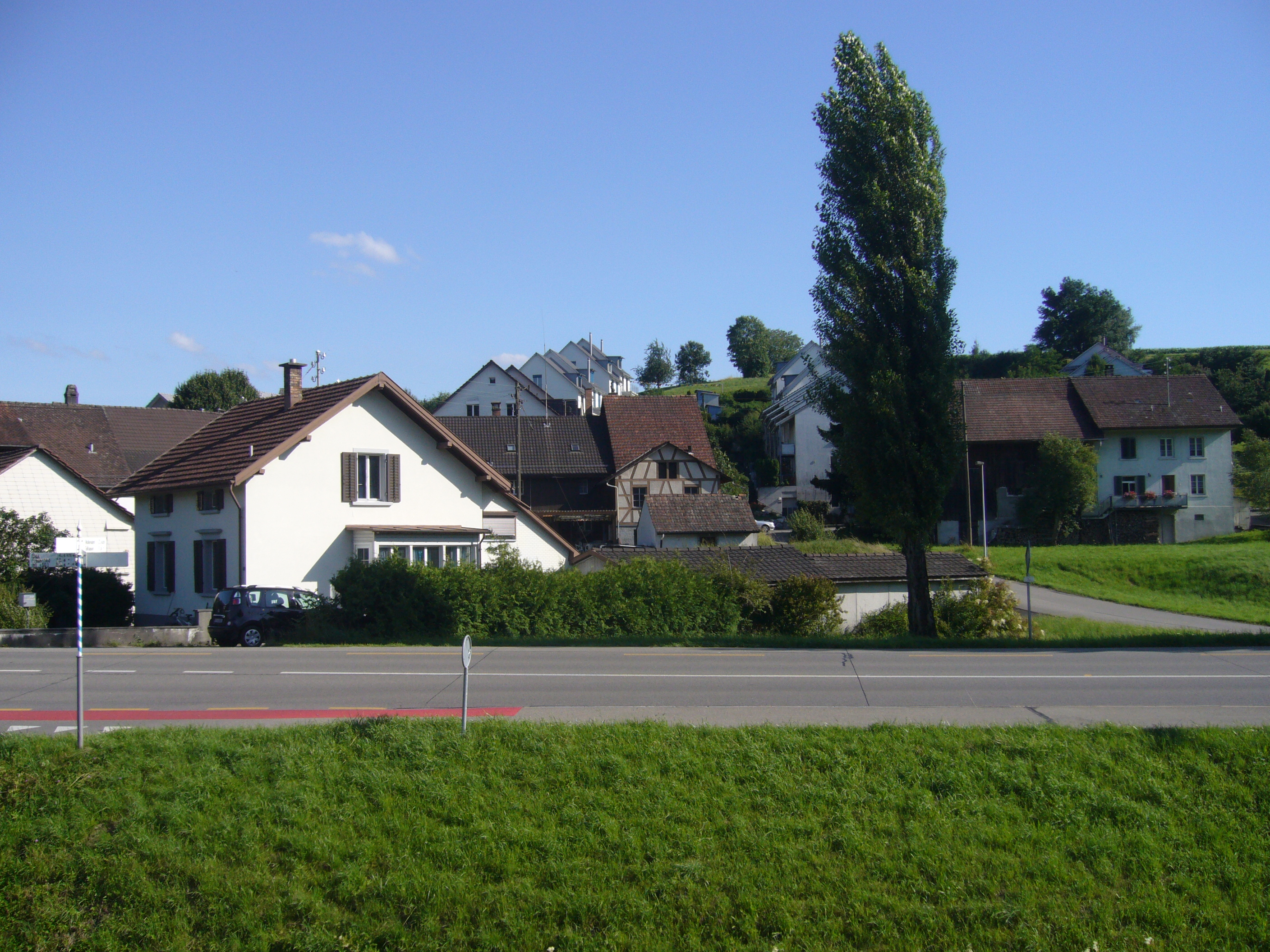 Blick über die St. Galler-Straß auf Häußer zů Unter-Schottikon.